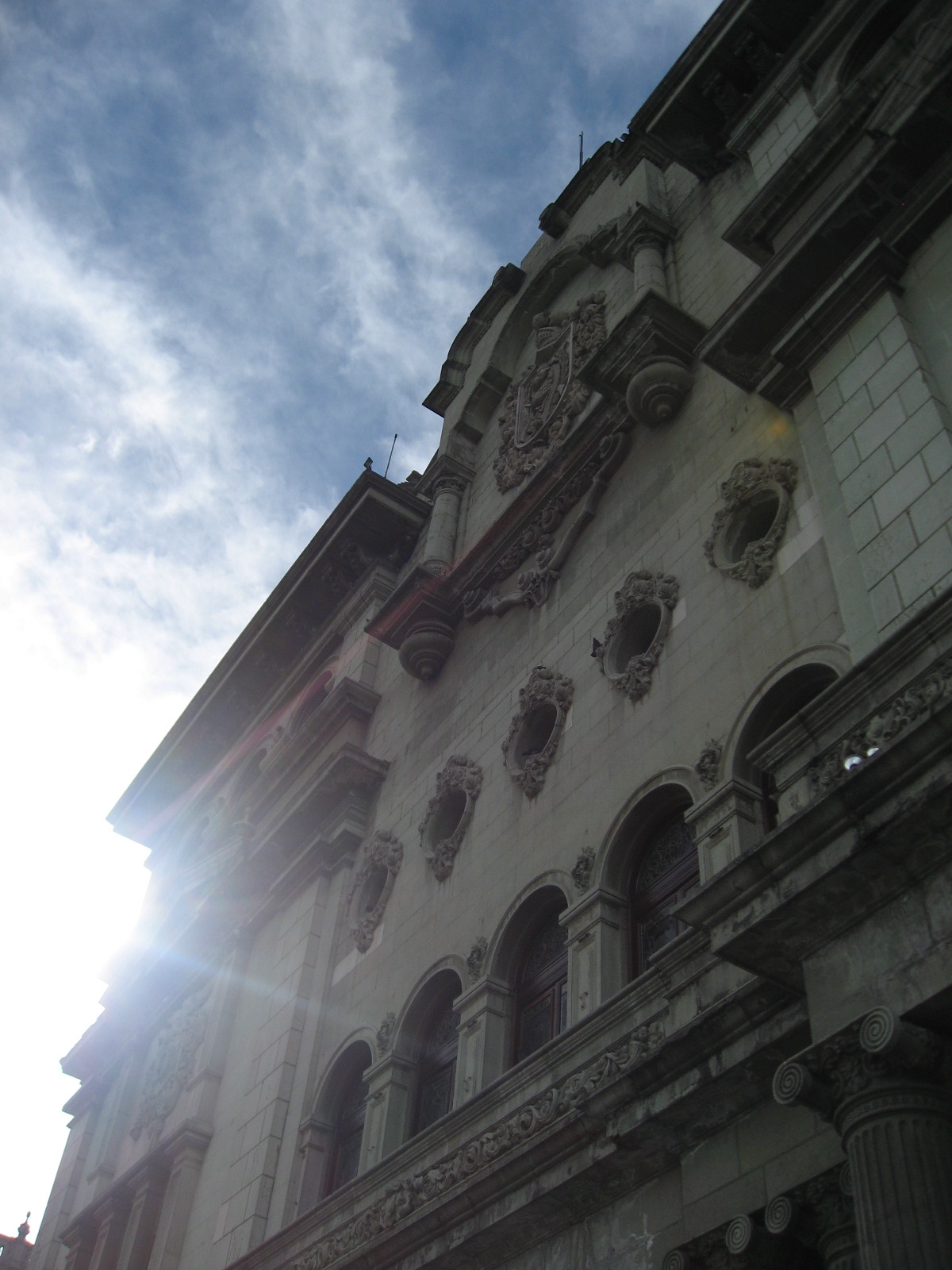 Cultural Palace in Guatemala City